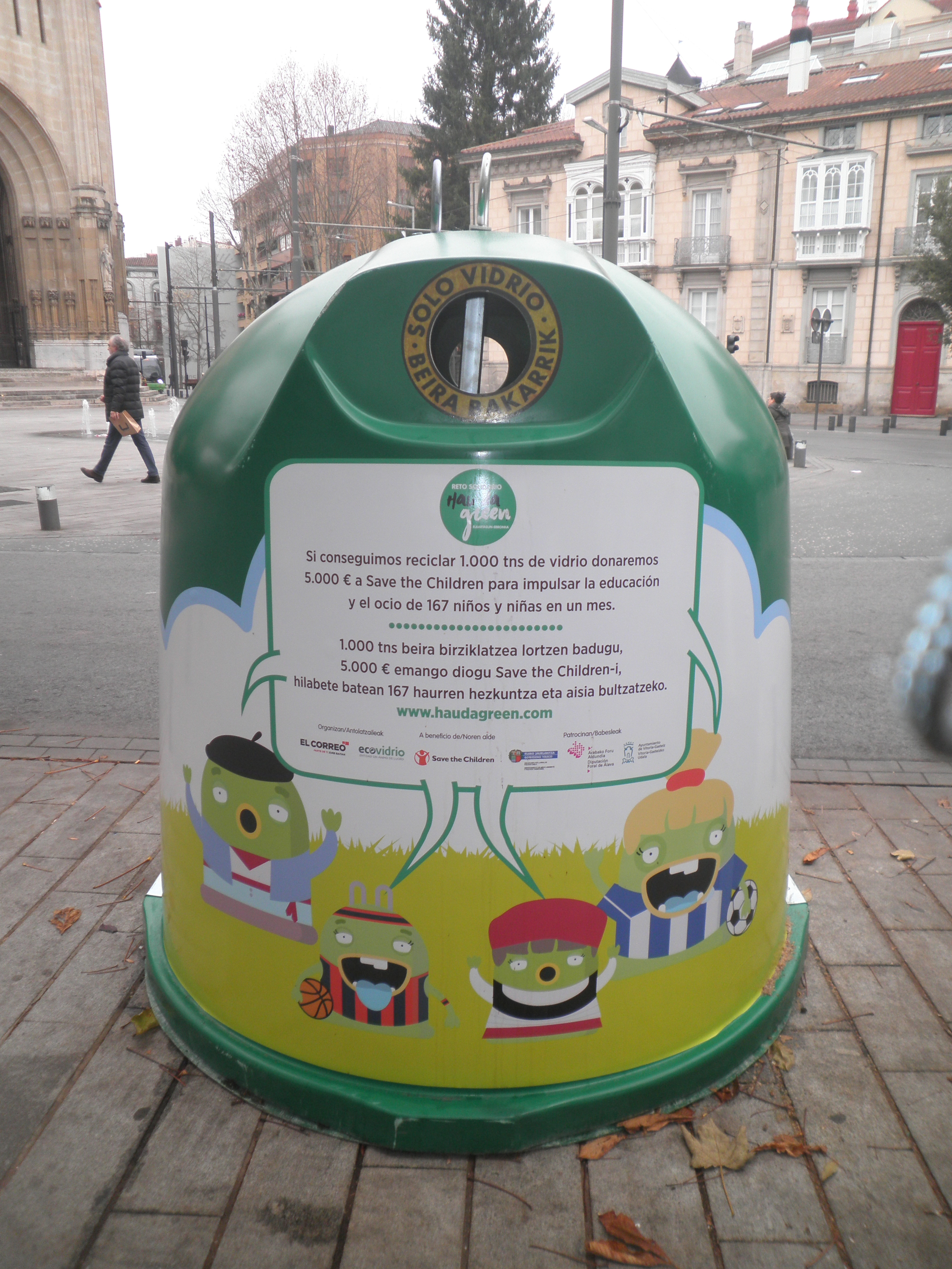 Beiraren edukiontzia Gasteizko erdialdean